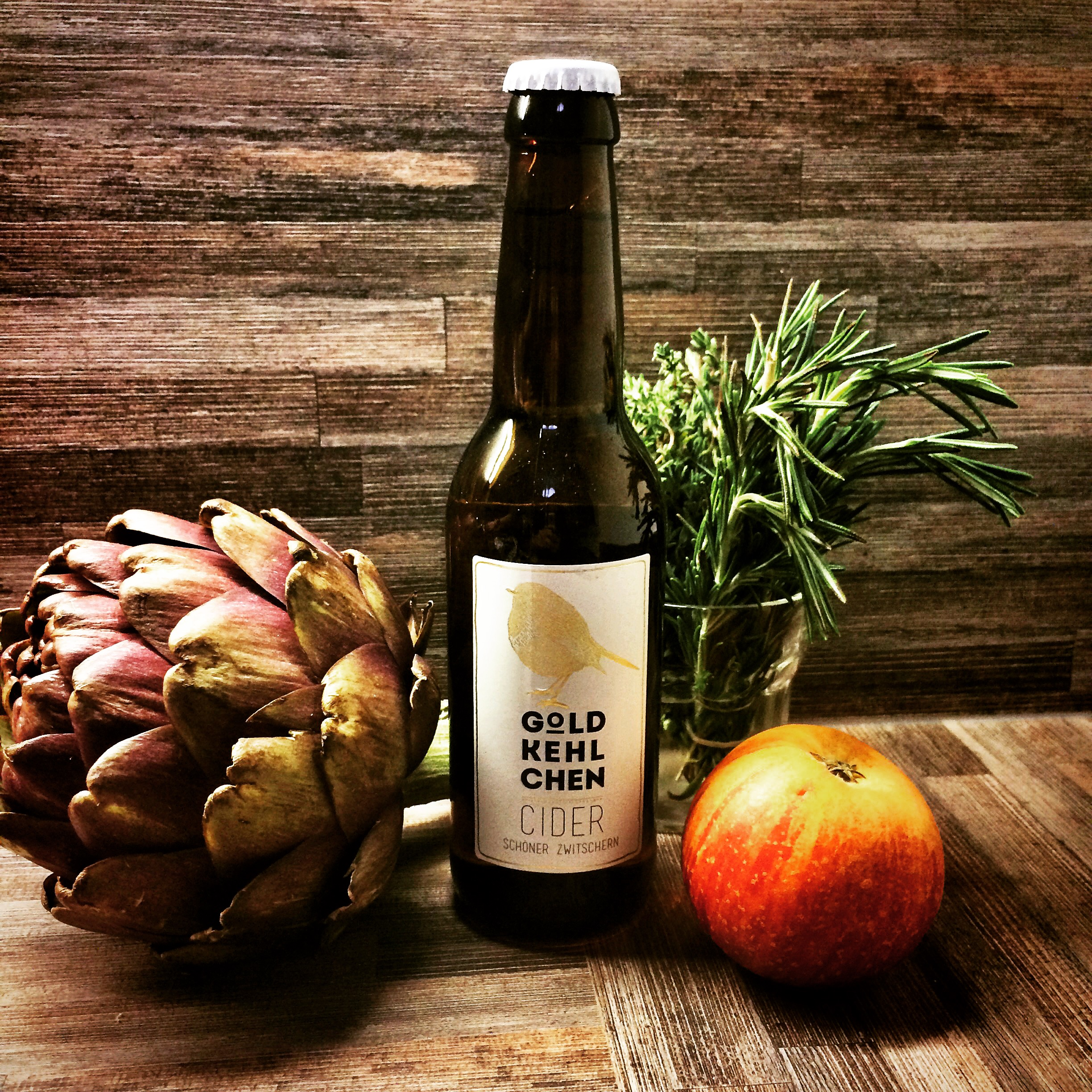 Apfelcider aus Österreich